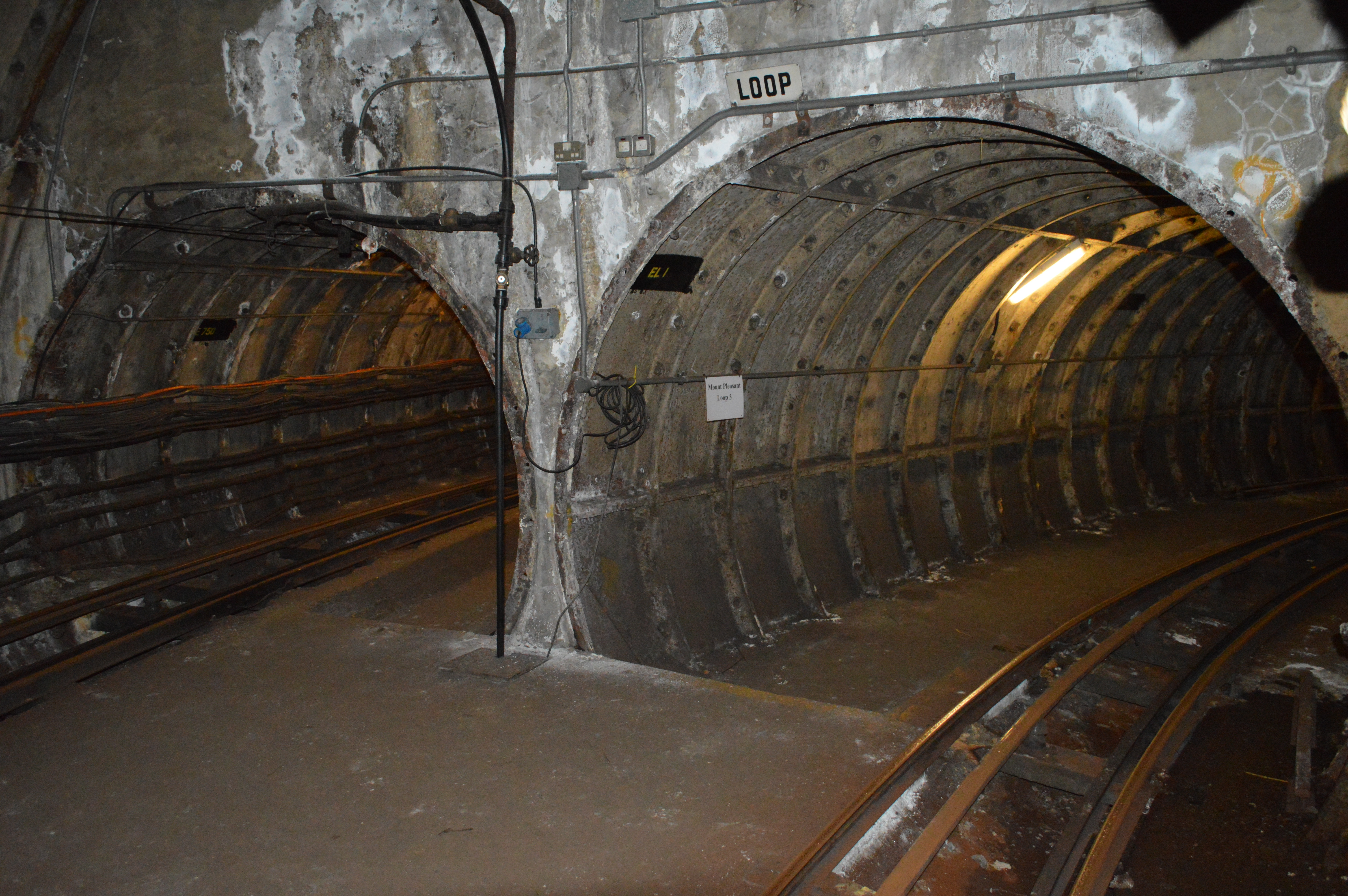 Split tunels